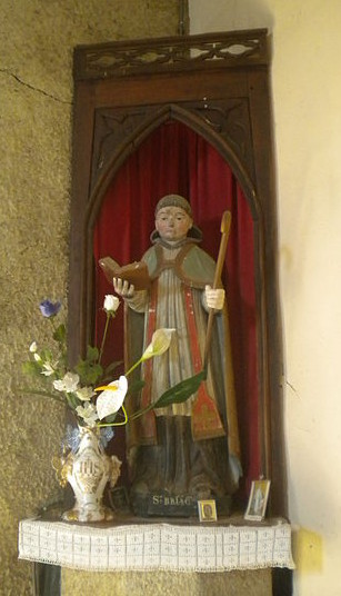 Sant Briag (Lanleñv)